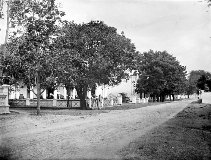 Negatief. Straat langs een logement, Rembang